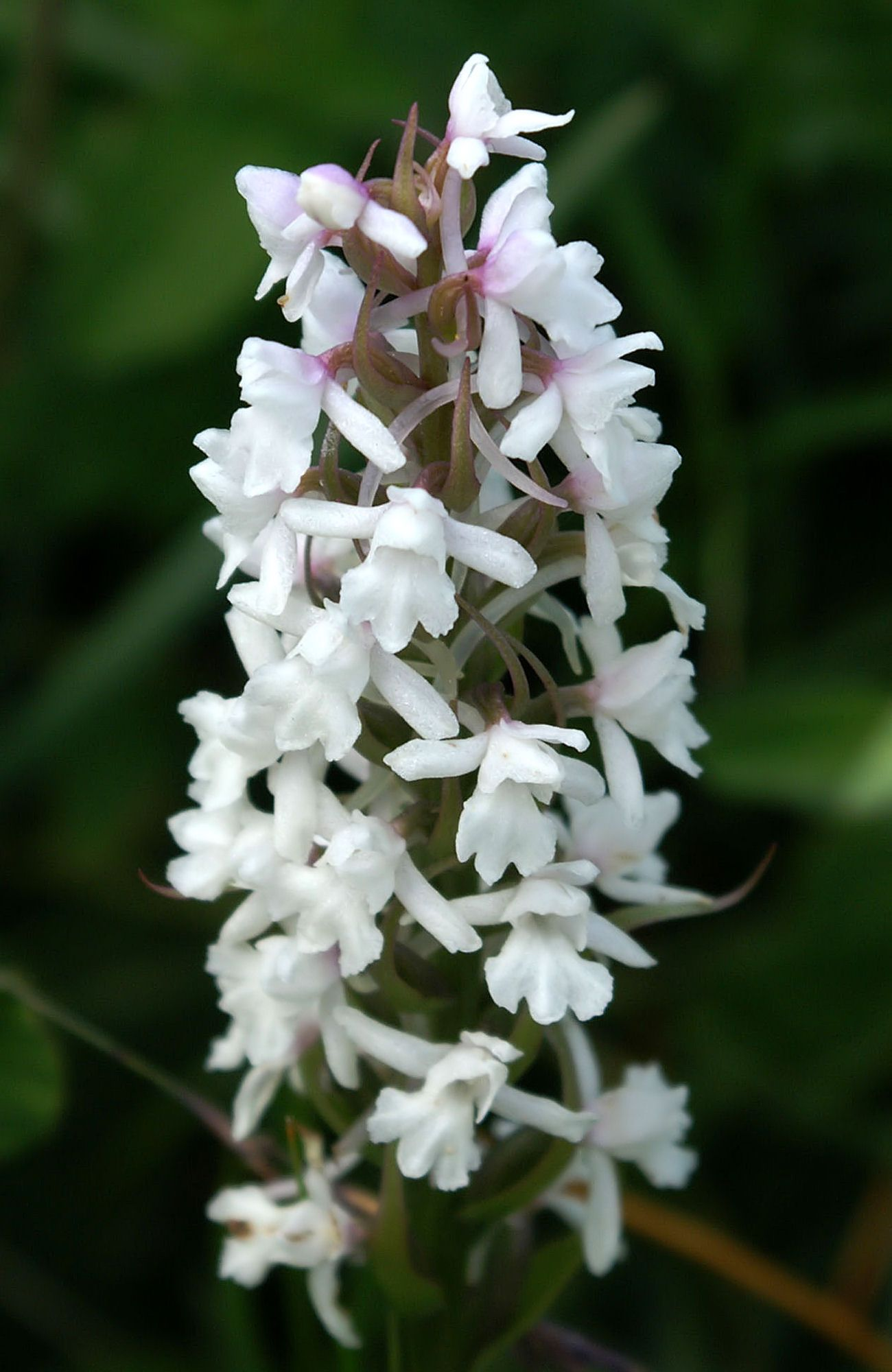 Gymnadenia conopsea